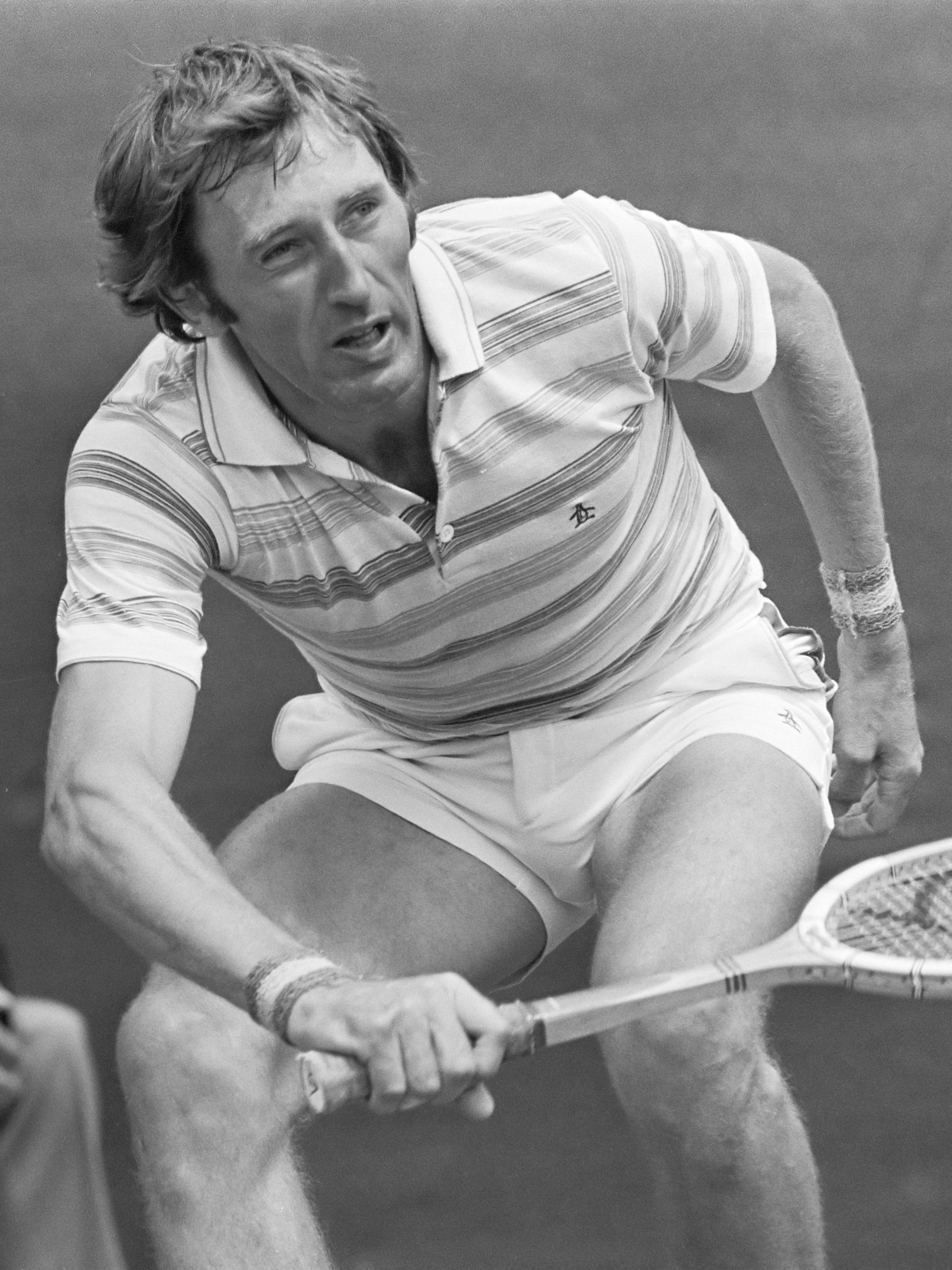 Internationaal tennistoernooi Melkhuisje, kwartfinale; Dibley (Australie) in actie 15 juli 1977